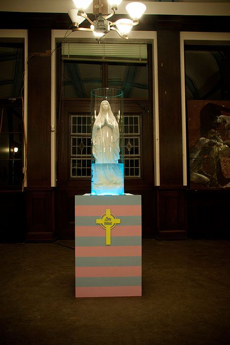 Pro Facebook "gefällt mir" Angabe auf vergoss die vom Street Art Künstler Stefan Strumbel im Jahr 2011 gestaltetete Marien-Statue eine Träne über das Kondom-Verbot der katholischen Kirche.